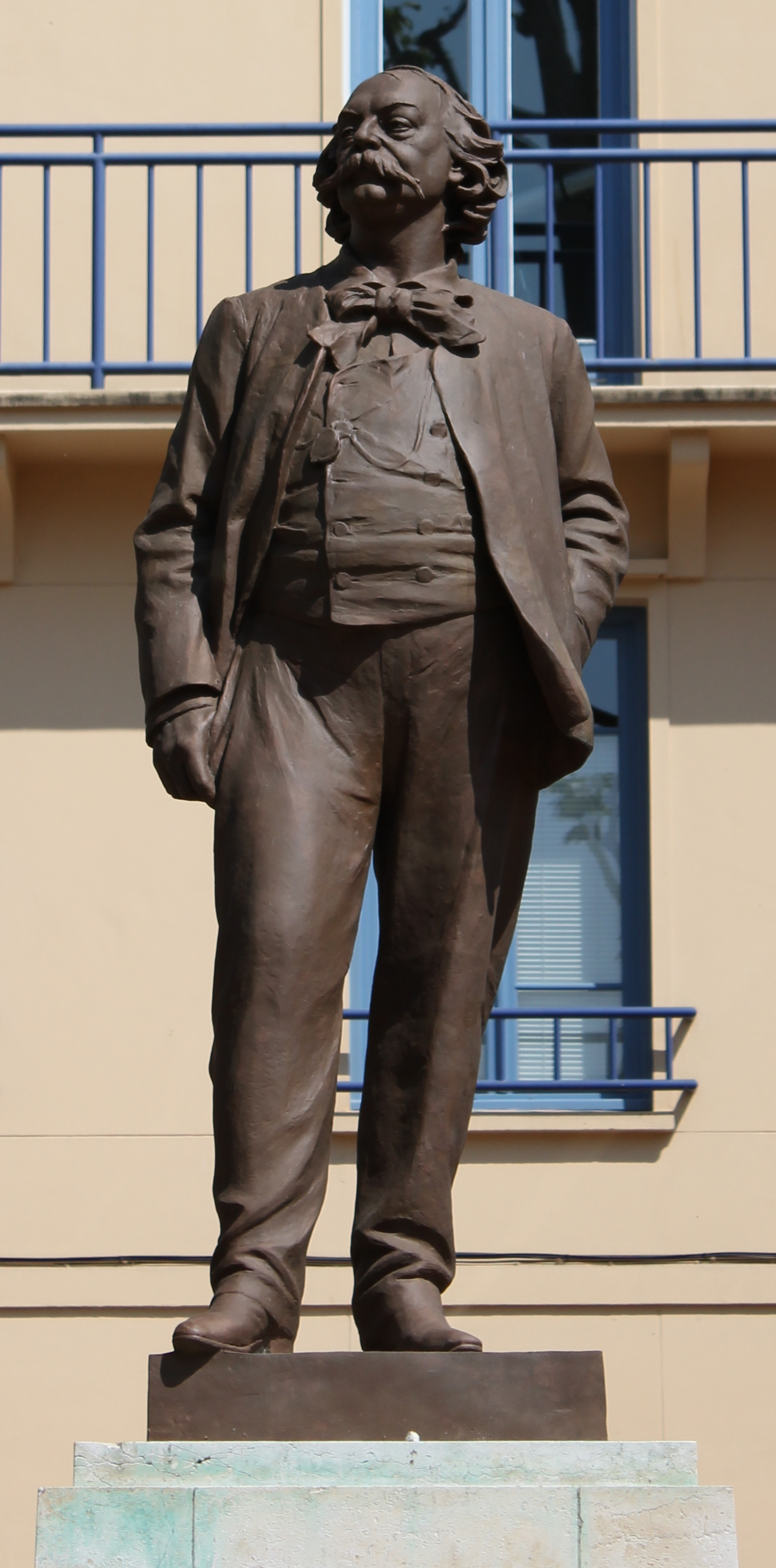 Statue de Gustave Flaubert de Léopold Bernstamm|, située place des Carmes à Rouen depuis 1965. La statue était située rue Thiers entre 1907 et 1941.